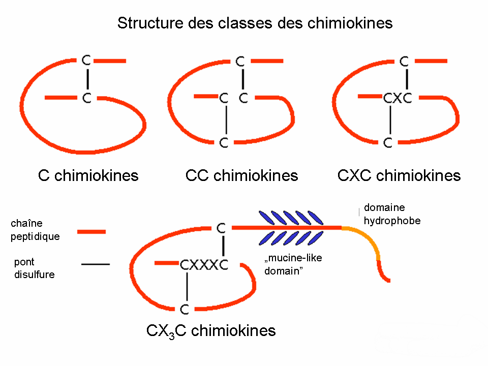 Structure des classes des chimiokines Kohidai, L. 2008